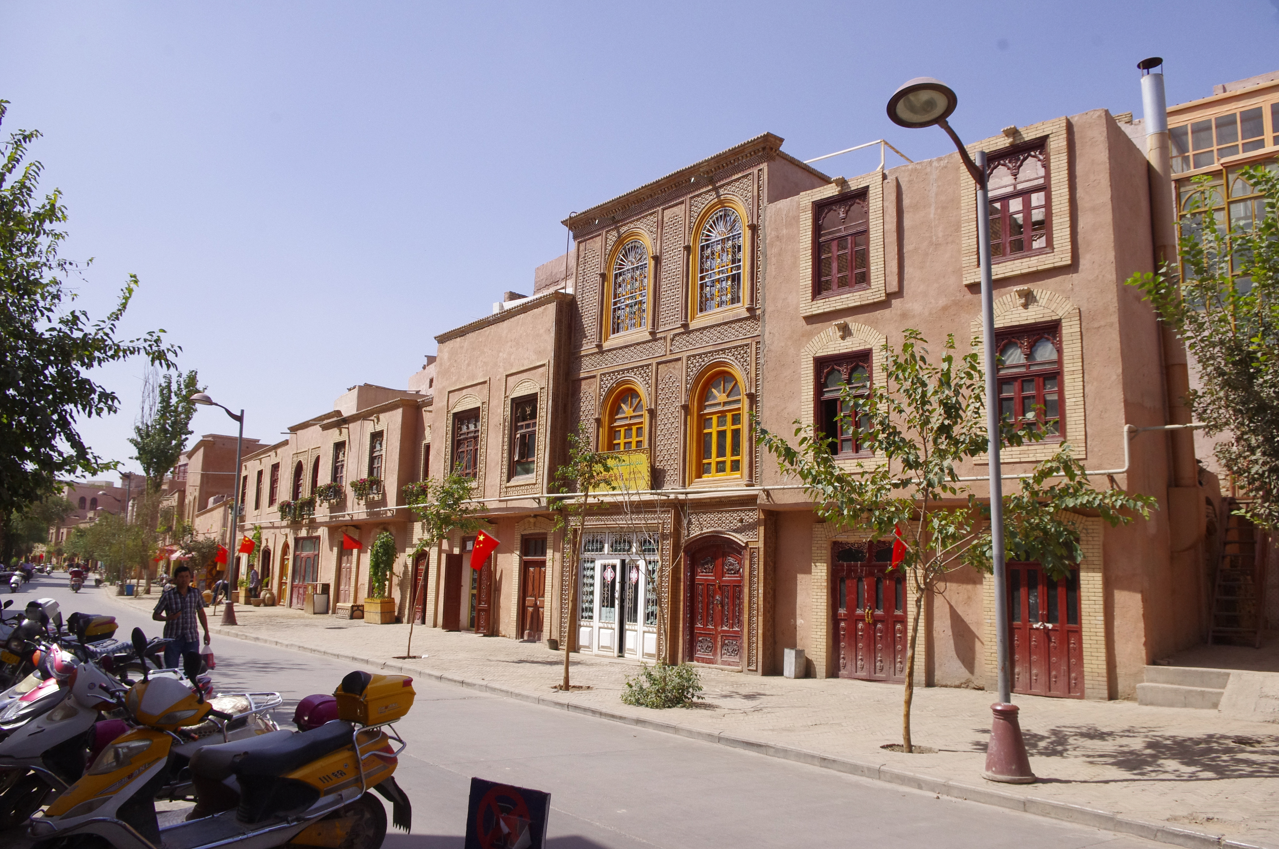 The making of this document was supported by Wikimedia Polska. To zdjęcie zostało wykonane podczas Wikiwyprawy 2015. Wszystkie zdjęcia z wyprawy możesz zobaczyć w kategorii: Wikiwyprawa 2015. English | polski | +/− To zdjęcie zostało załadowane dzięki współpracy z firmą Hyperbook. polski | +/− To zdjęcie zostało załadowane dzięki współpracy z firmą: Kopex Group. English | polski | +/−